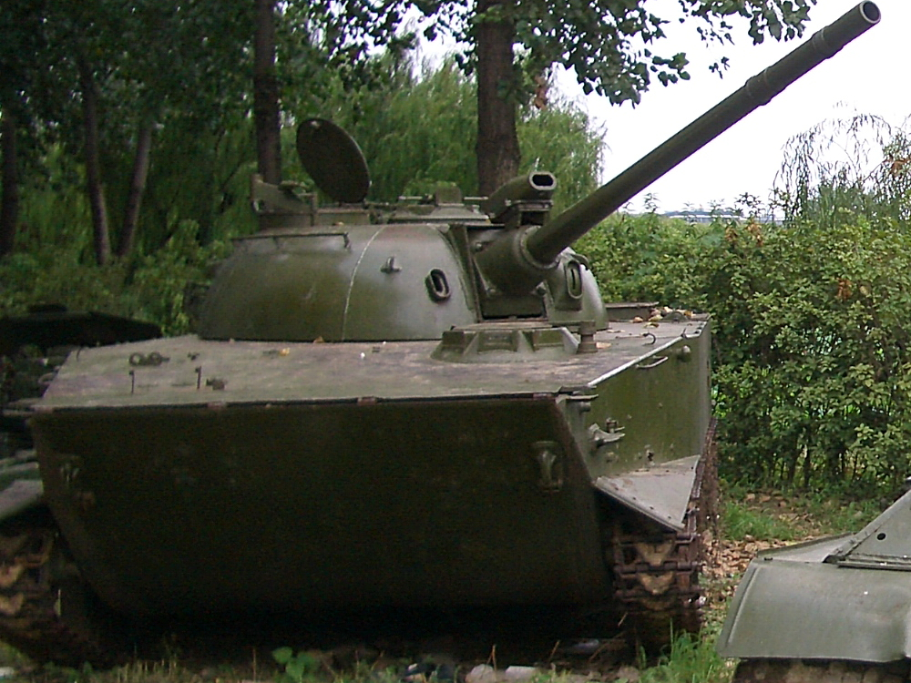 中国63式水陆坦克，在火炮防盾上安装有激光测距仪。